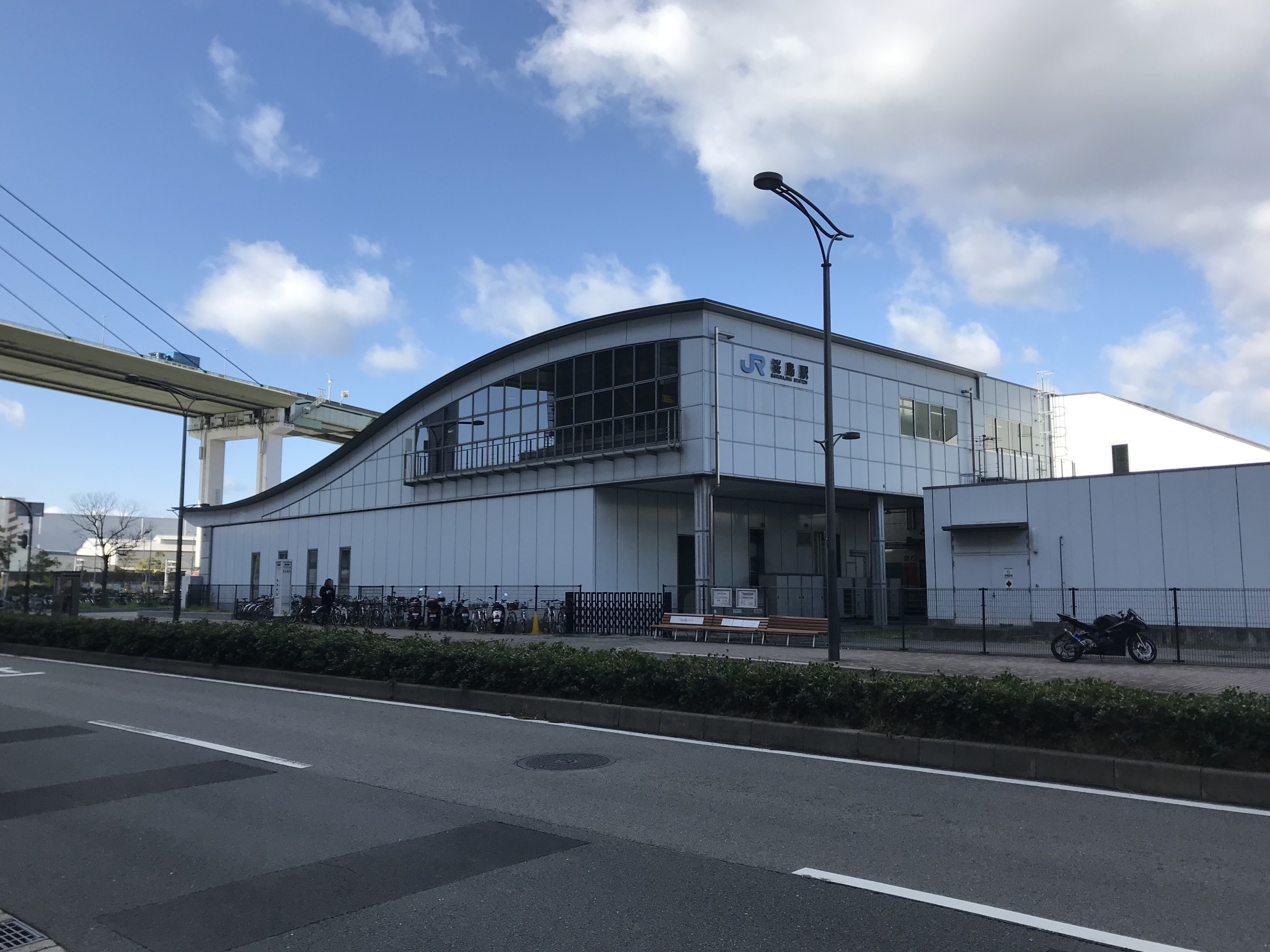 桜島駅の駅舎